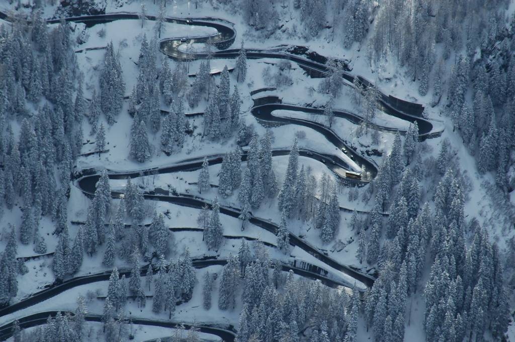 Palm-Express am Malojapass; vom Piz Lunghin fotografiert